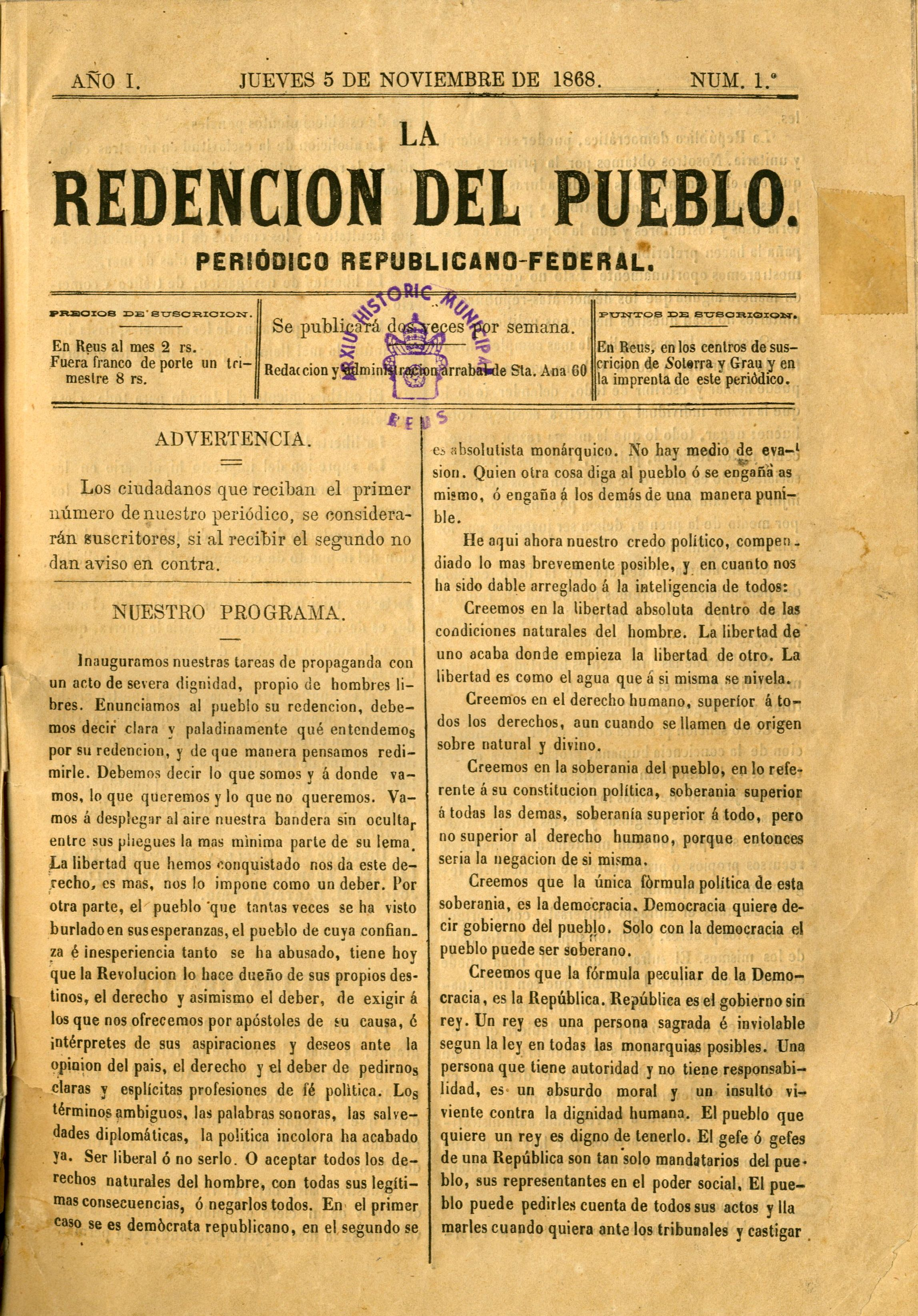 Primera pàgina del núm. 1 de La Redención del Pueblo